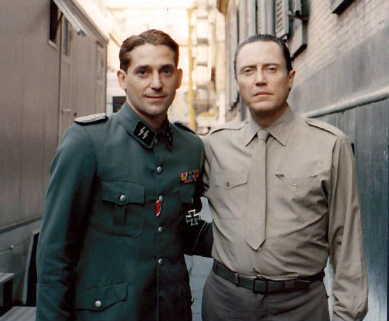 Steve Scott et Christopher Walken sur le tournage de Celluloide en 1996.